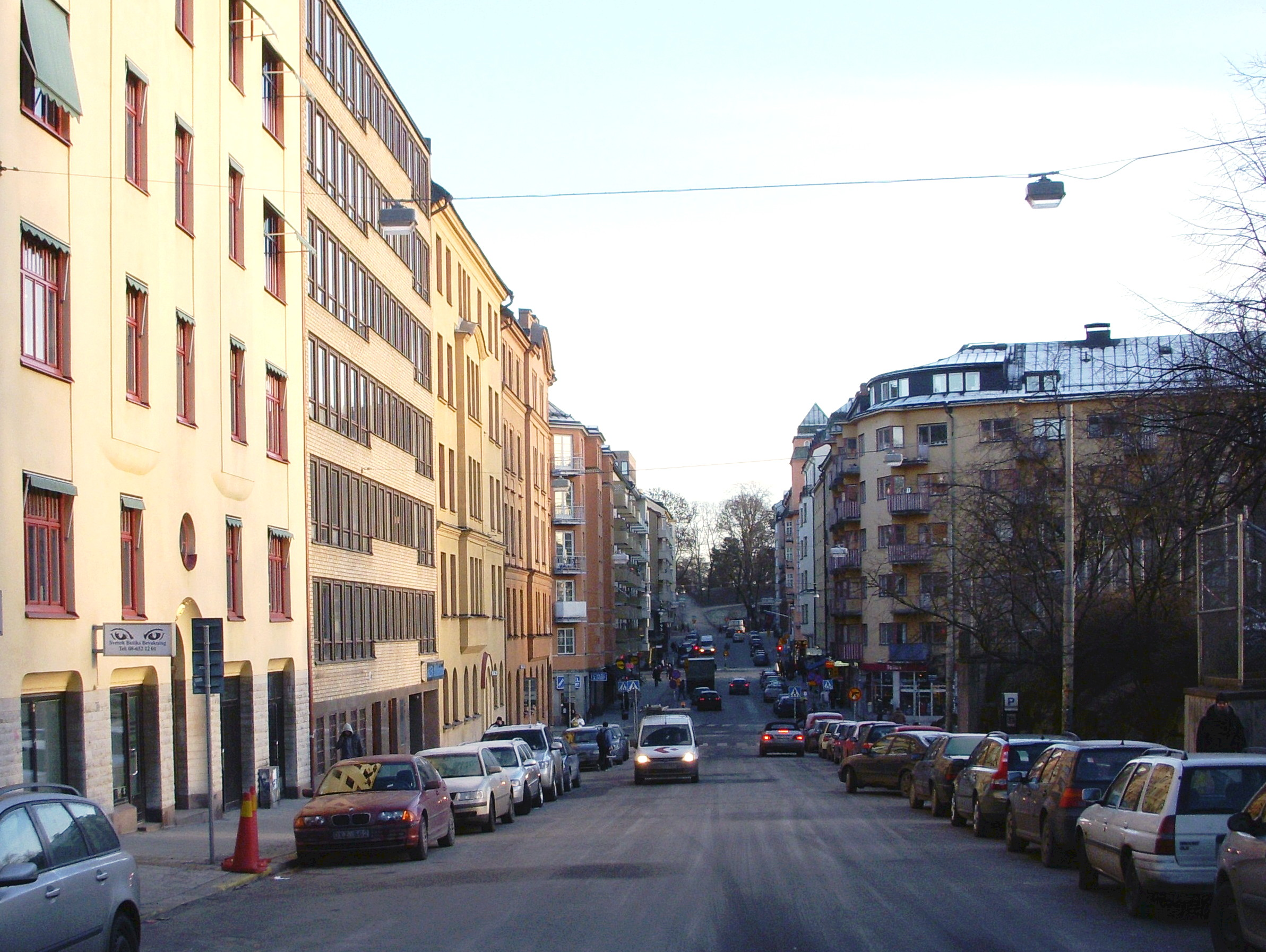 Sankt Göransgatan på Kungsholmen i Stockholm, vy mot öst, längs i bakgrunden syns Kronobergsparken